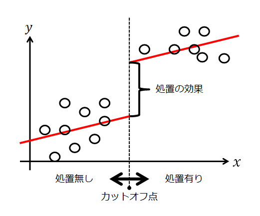 回帰不連続デザインの説明